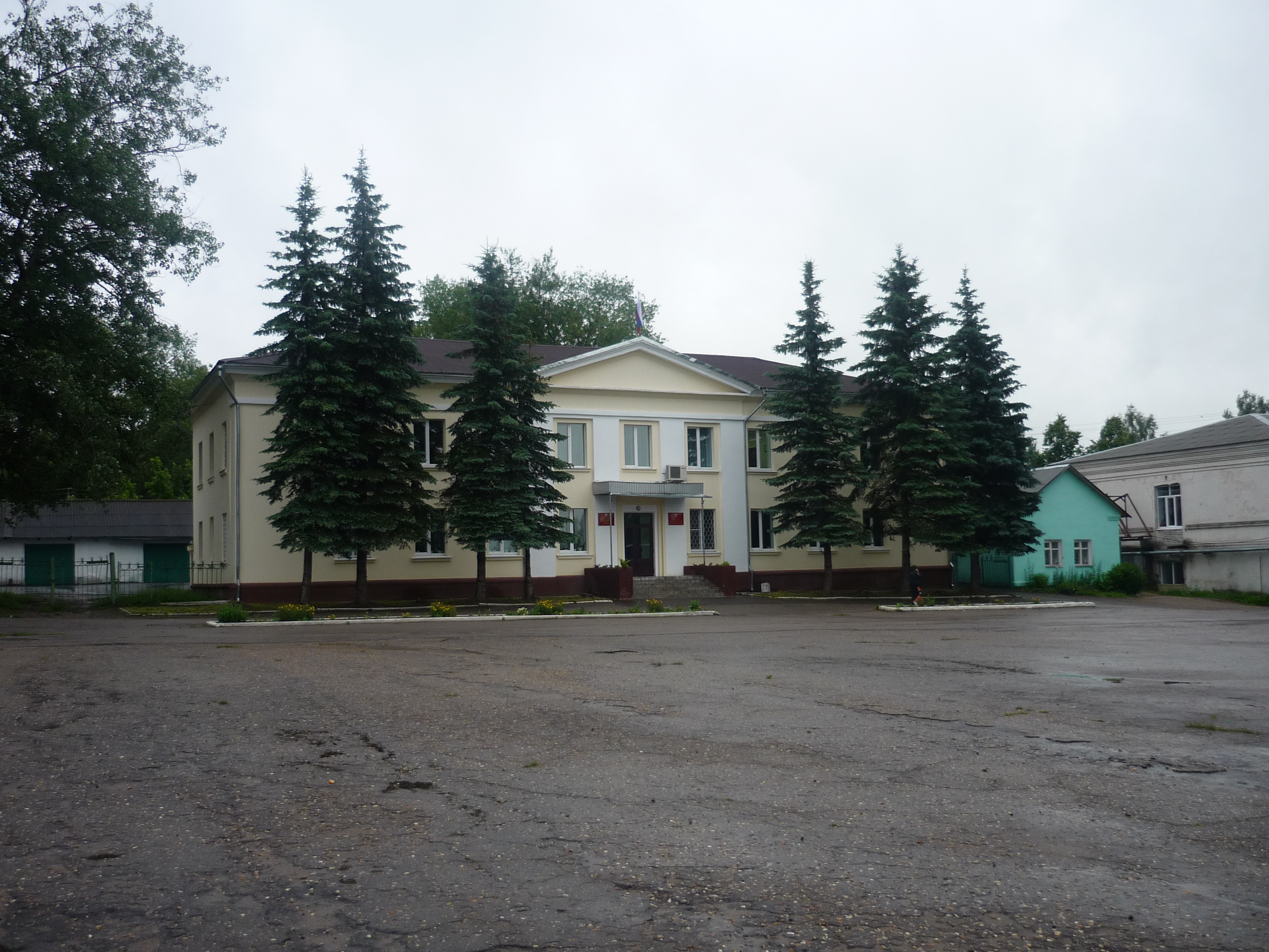 Здание администрации в Сычёвке